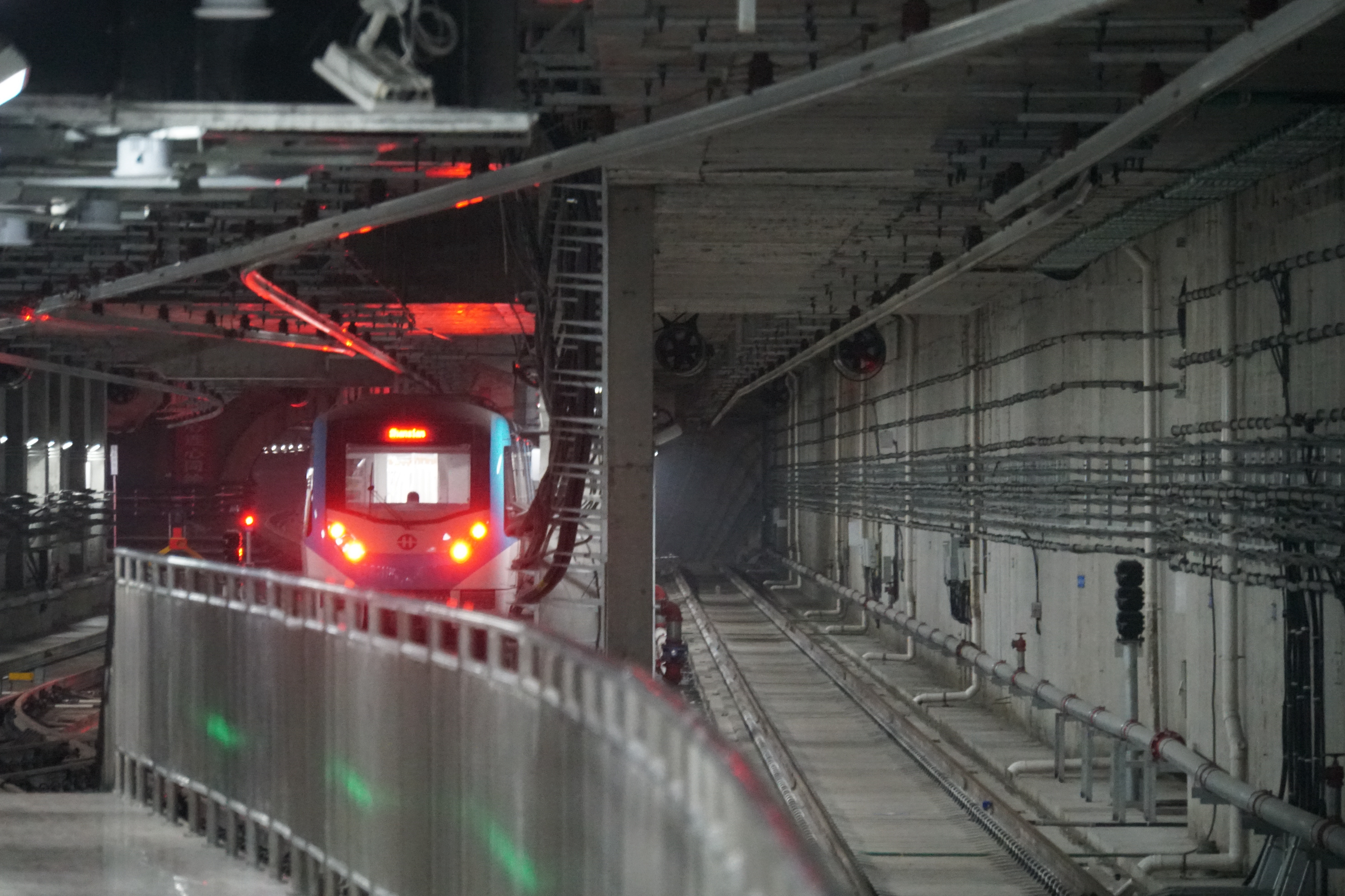 蒋村站存车线